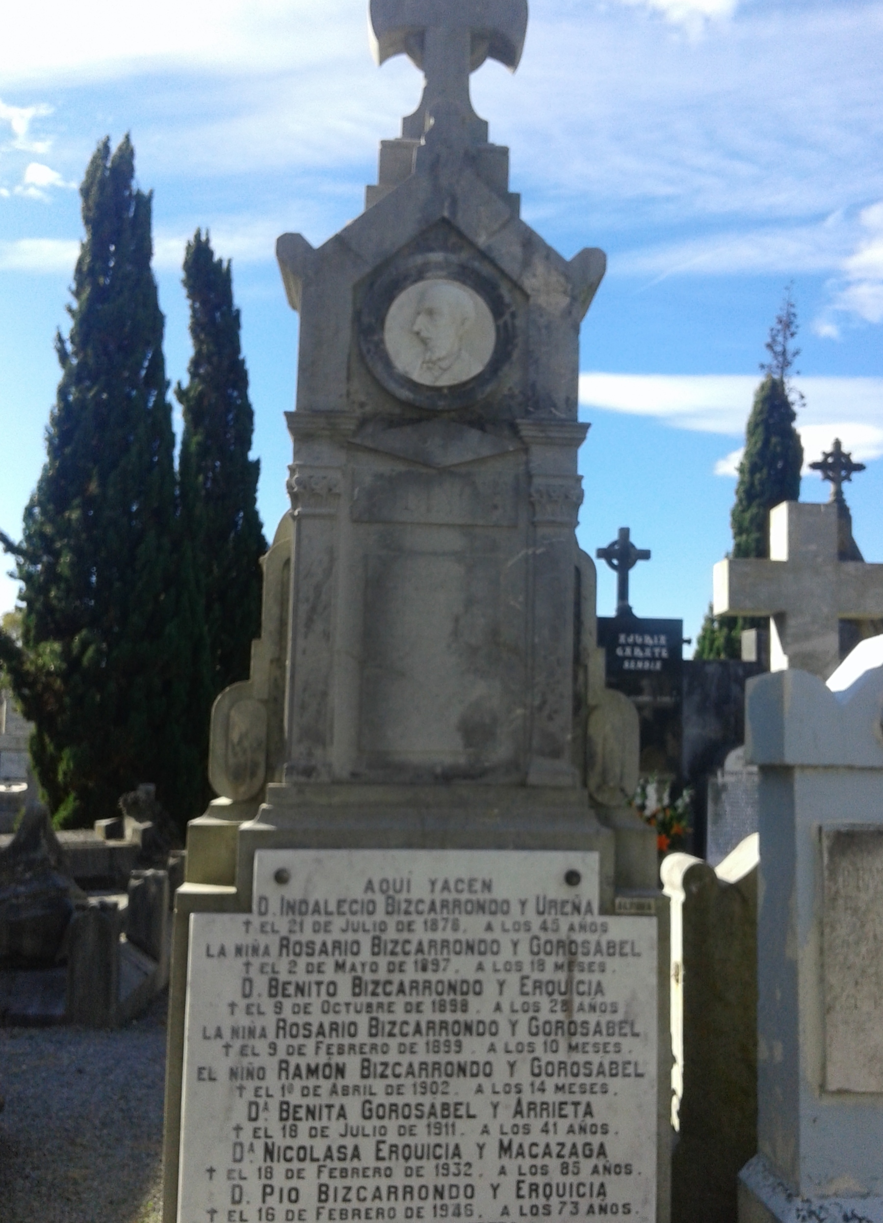 Bilintx idazlearen panteoia Donostiako Polloe hilerrian.